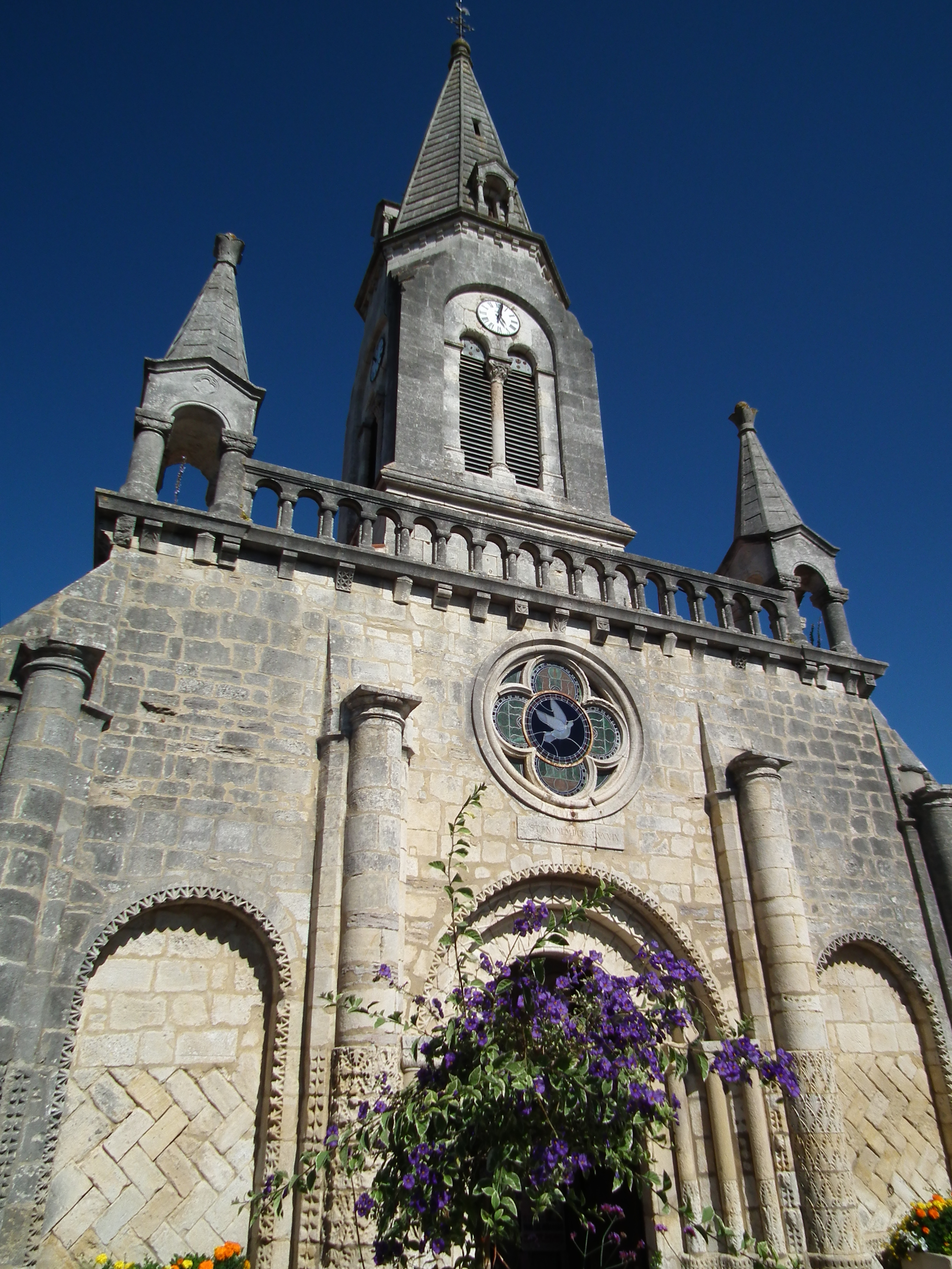 L'église de Saint-Denis-d'Oléron